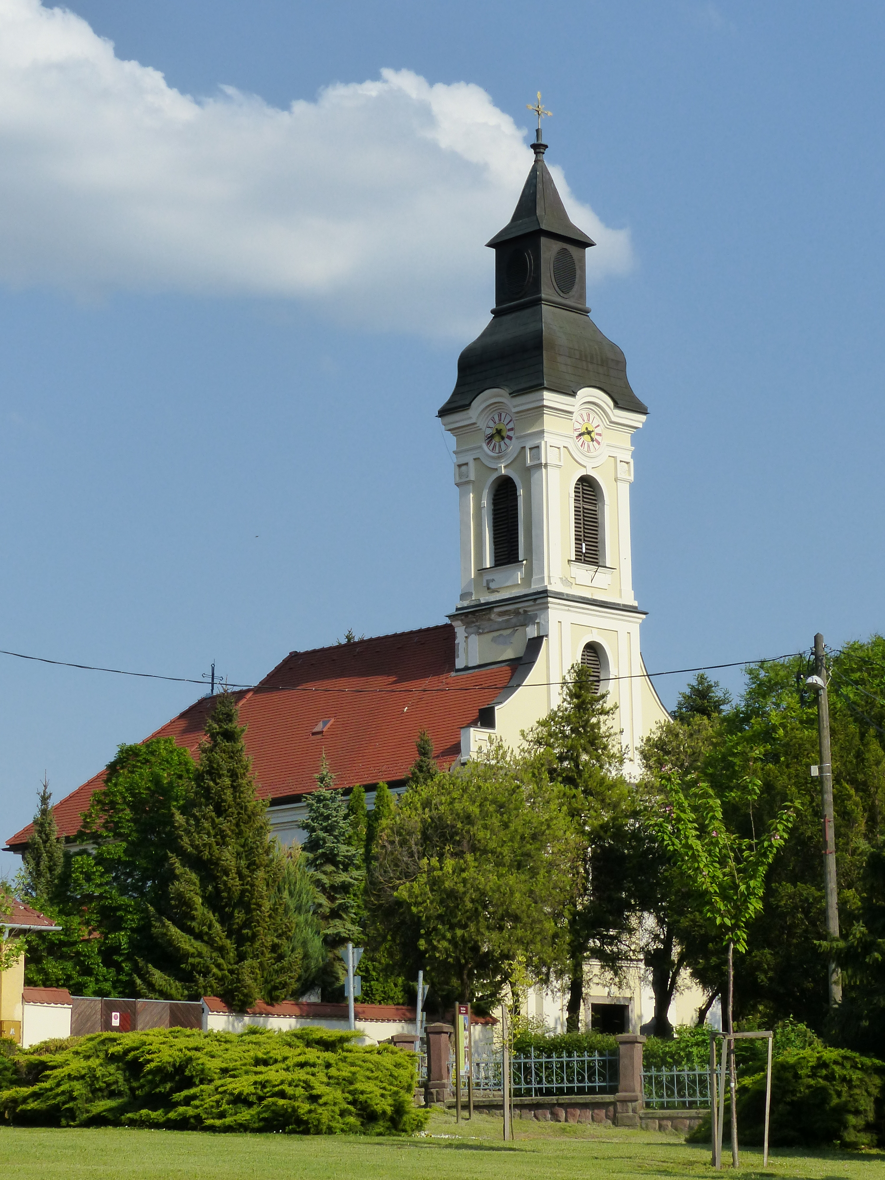 A 2018. április 29-én, vasárnap készült felvételen a Katolikus templom.